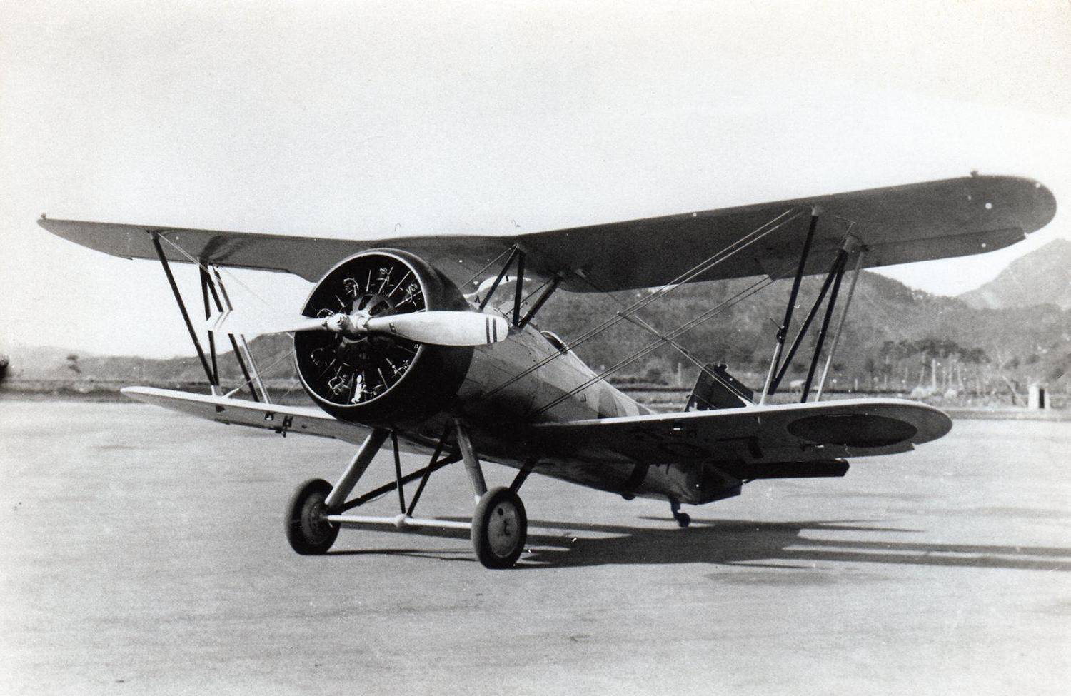 空母「龍驤」所属の95式艦戦。後方の山は鹿屋基地北方に広がる高隈山系一部の「郷之原の丘」。現在、この丘の麓に「特攻慰霊塔」がある。